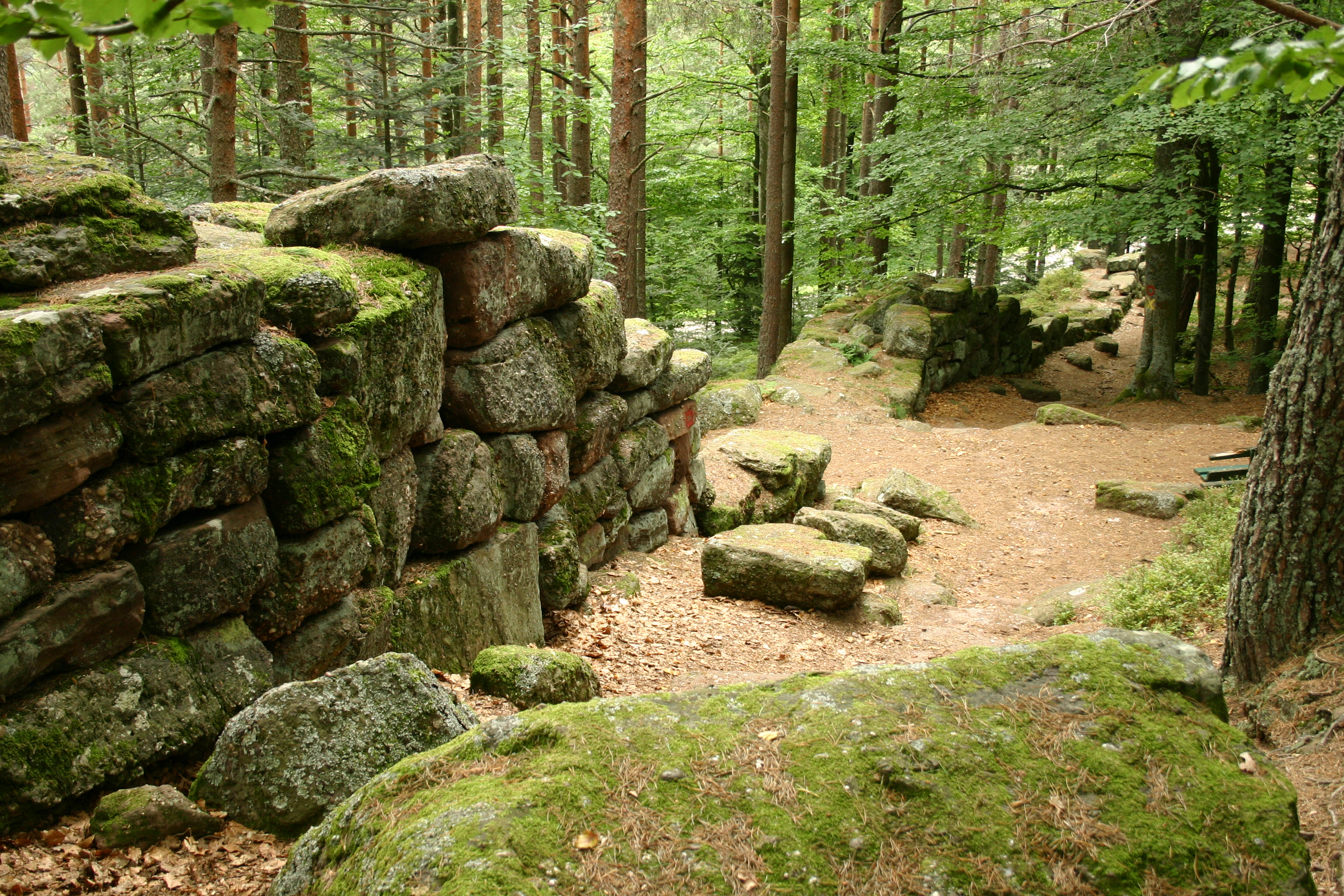 Odilienberg, Heidenmauer/Le mur païen